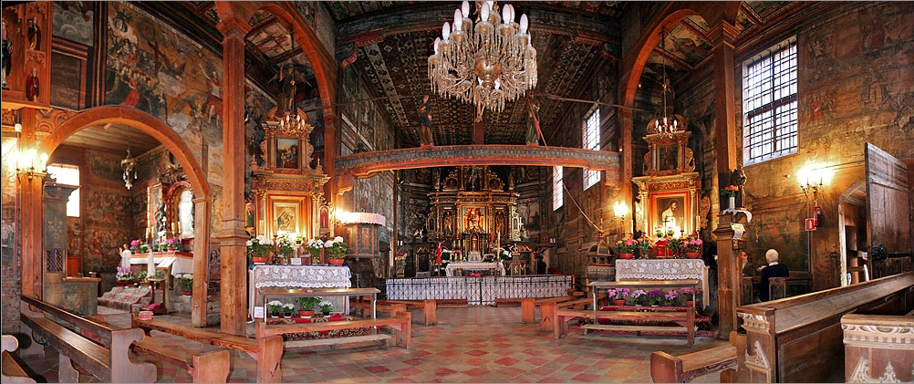 Wnętrze drewnianego kościoła w Binarowej wpisanego na listę UNESCO